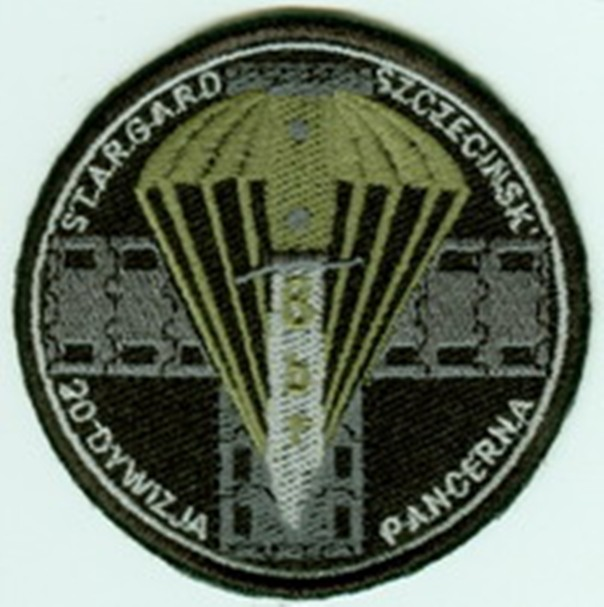 Naszywka 8br na mundur polowy